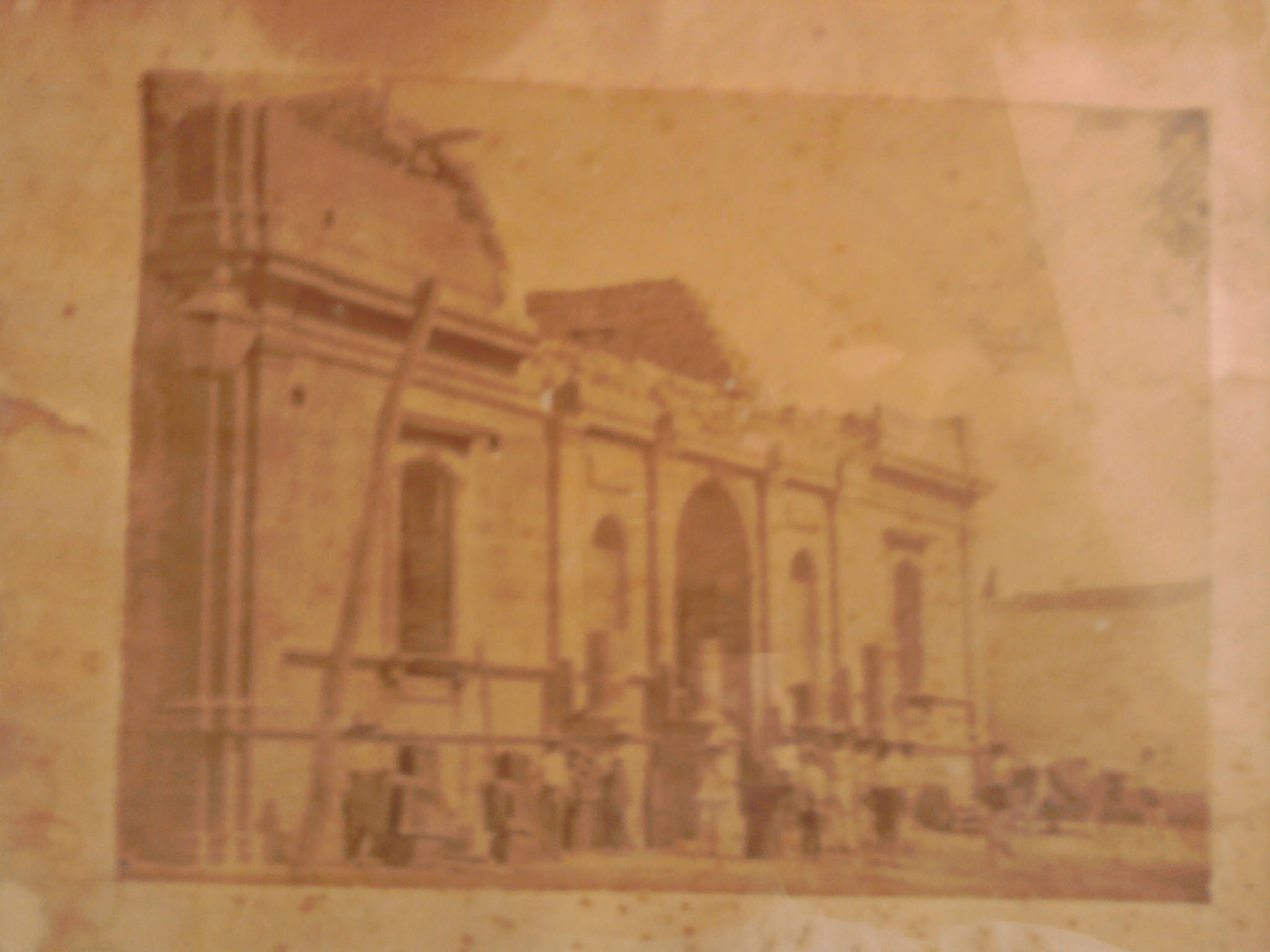 Parroquia de Nuestra Señora del Refugio en construcción, siglo XIX.